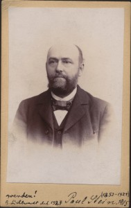 German entomologist Paul Stein (1852-921)